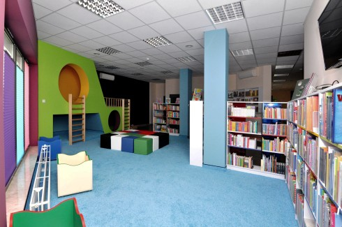 Filia nr 38 Miejskiej Biblioteki Publicznej w Lublinie